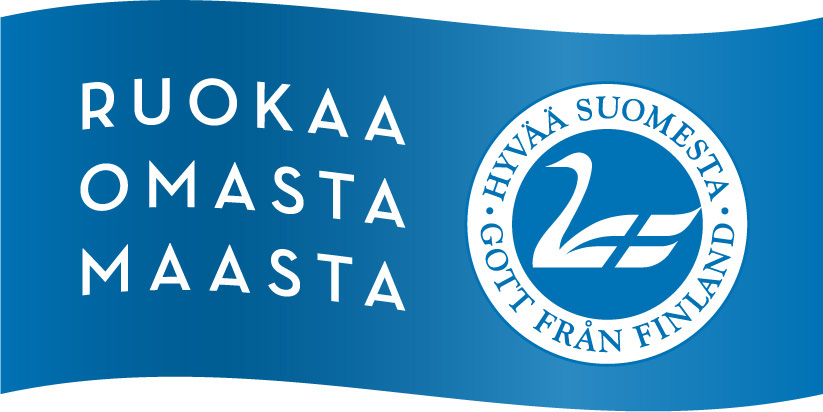 Hyvää Suomesta -merkin rinnalle vuonna 2012 lanseerattu Ruokaa omasta maasta -tunnus